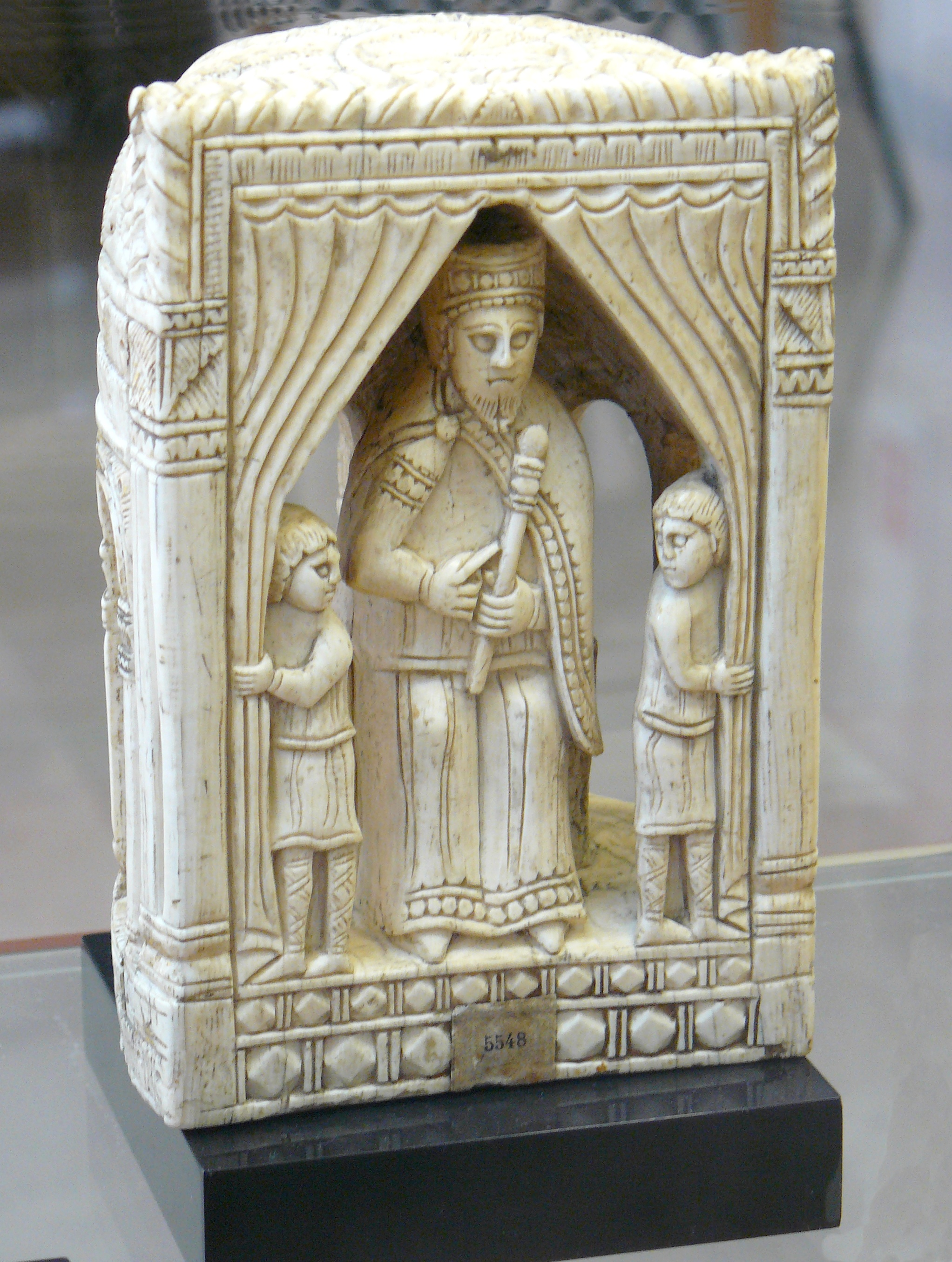 Échiquier dit de Charlemagne, roi, ivoire d'éléphant, XIe siècle, Italie méridionale, trace de peinture, d'un ensemble de 16 pièces conservées dans le trésor de Saint-Denis - Hauteur environ 8 cm - Cabinet des médailles, Paris, n° Inv 305 à 323